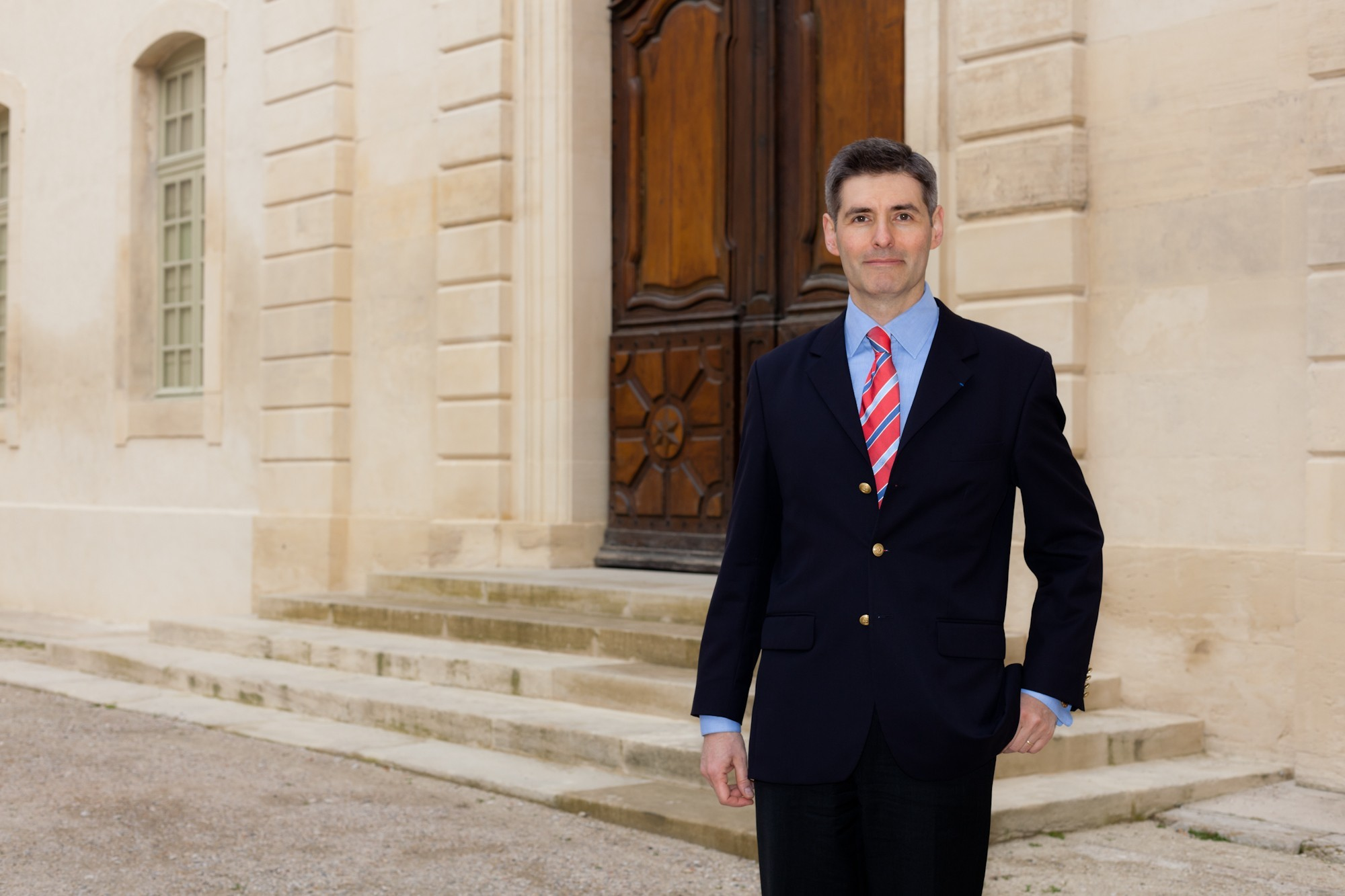 Jean-François Delmas, conservateur général, directeur de la bibliothèque Inguimbertine et des musées de Carpentras